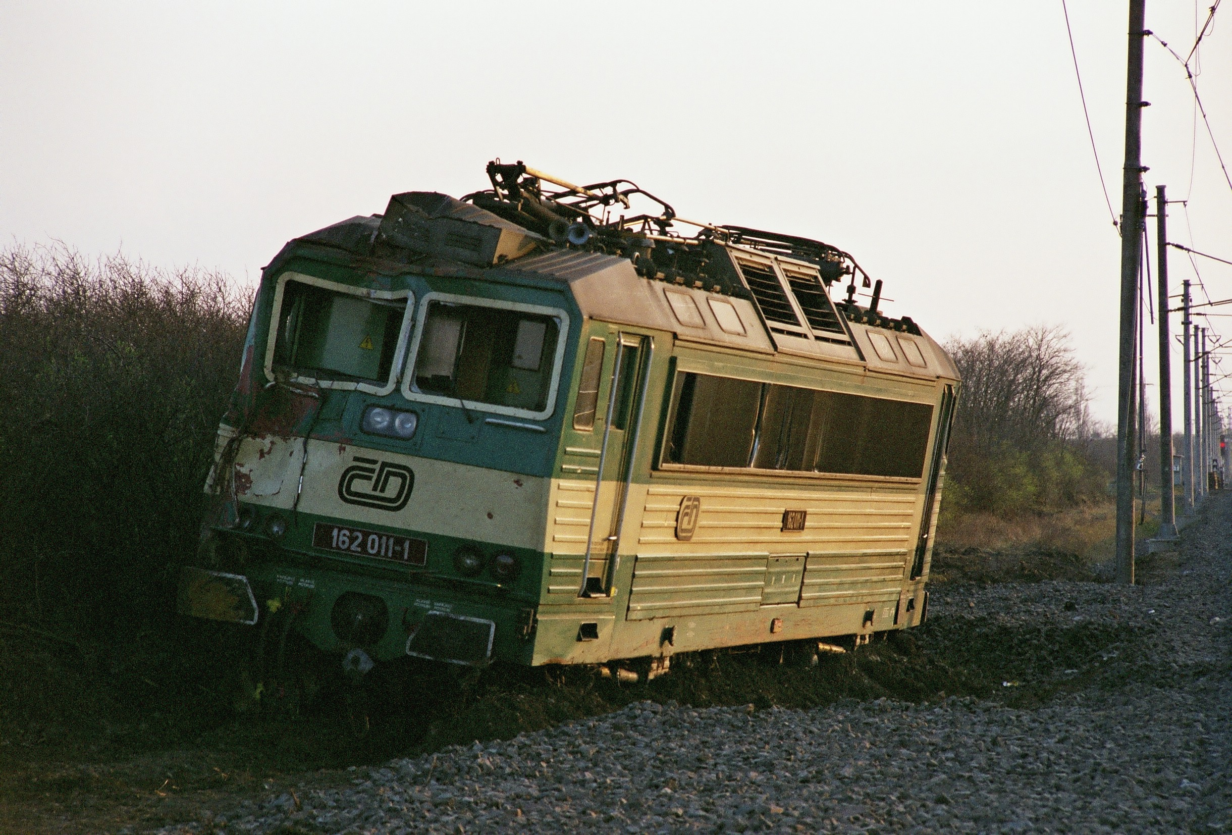 Lokomotiva 162 011-1 po nehodě den před nakolejením a odvezením do opravny